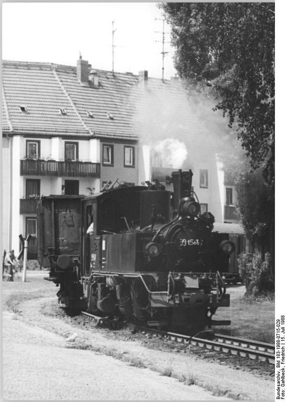 Dampflok 99 1568 (BR 99) ADN-ZB Gahlbeck 15.7.88 Bez. Leipzig: Städteporträt Oschatz - Eine Besonderheit der 45 Kilometer von Leipzig entfernt gelegenen Kreisstadt Oschatz ist die einzige Schmalspurbahn der DDR, die, ausschließlich Güter transportierend, quer durch die Stadt fährt zum 14 Kilometer entfernten Ort Mügeln. (siehe ADN-Beitrag vom 19.7.88 und 26 -28N)